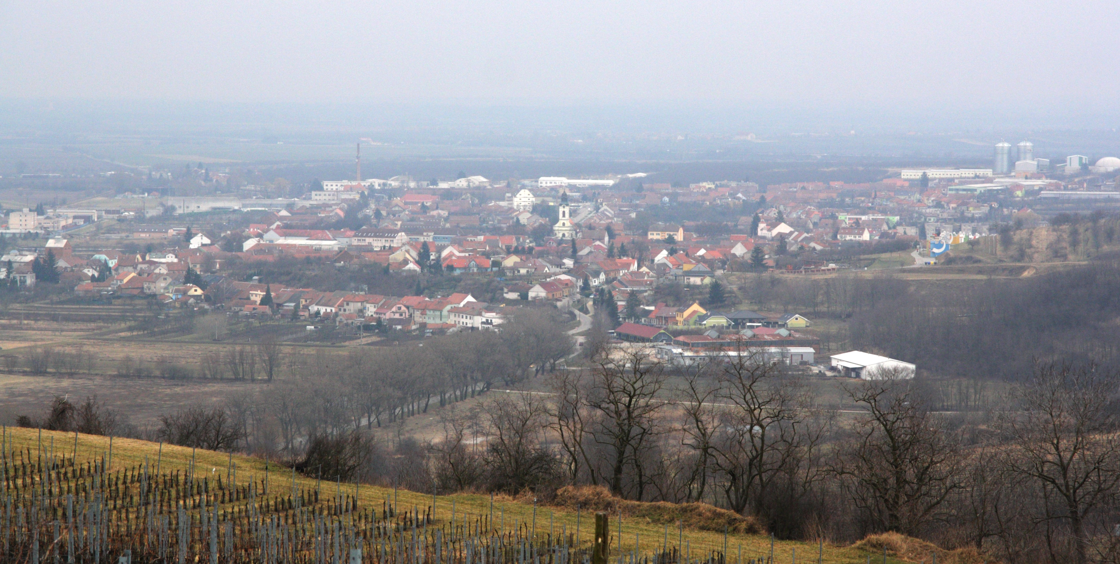 Velké Pavlovice - pohled od severu.